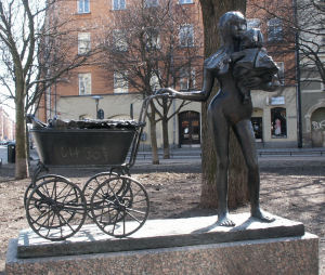 "Jannica och dockvagnen" by Gunnel Frieberg at Katarina Bangata, Stockholm, Sweden.